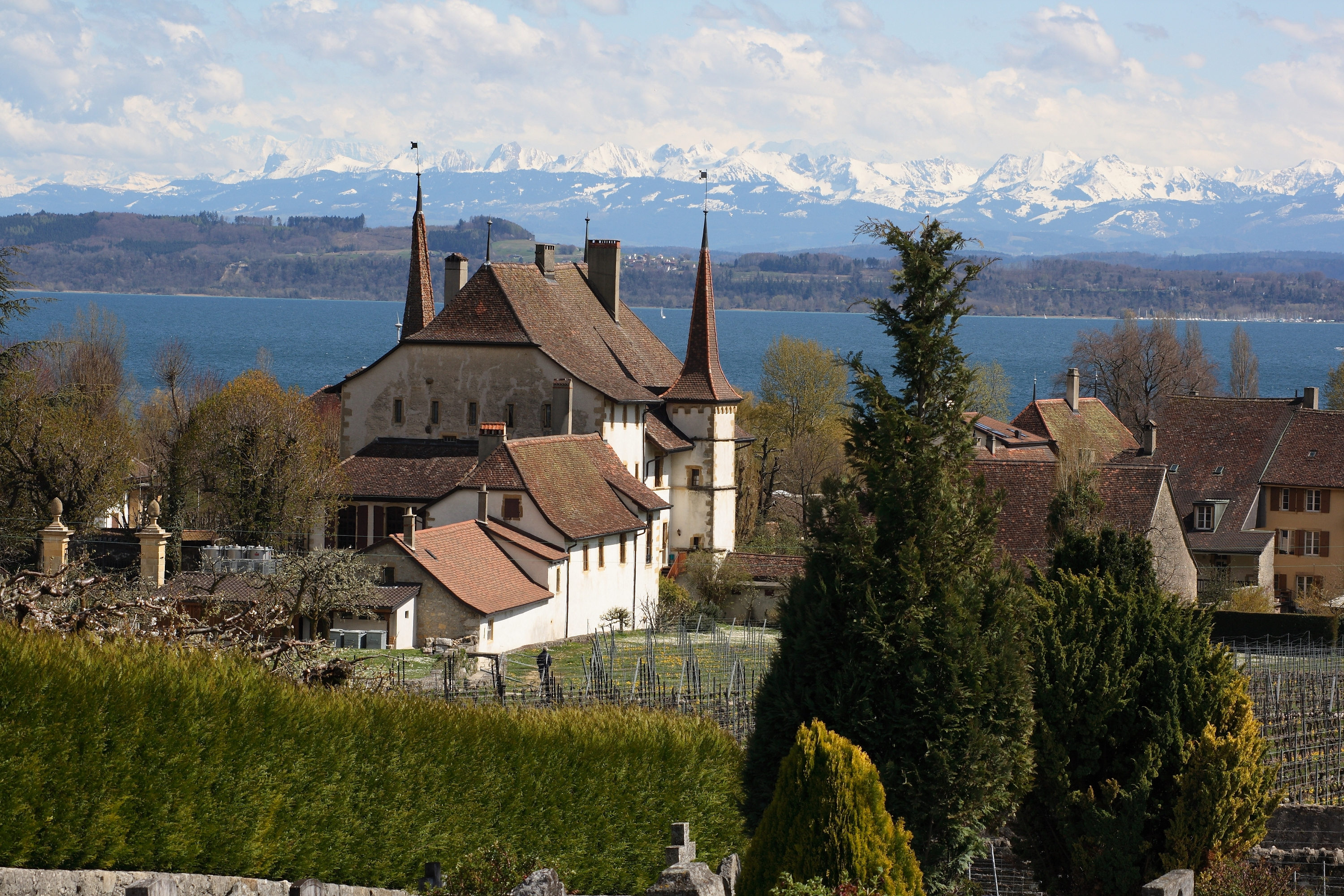 Le château d'Auvernier